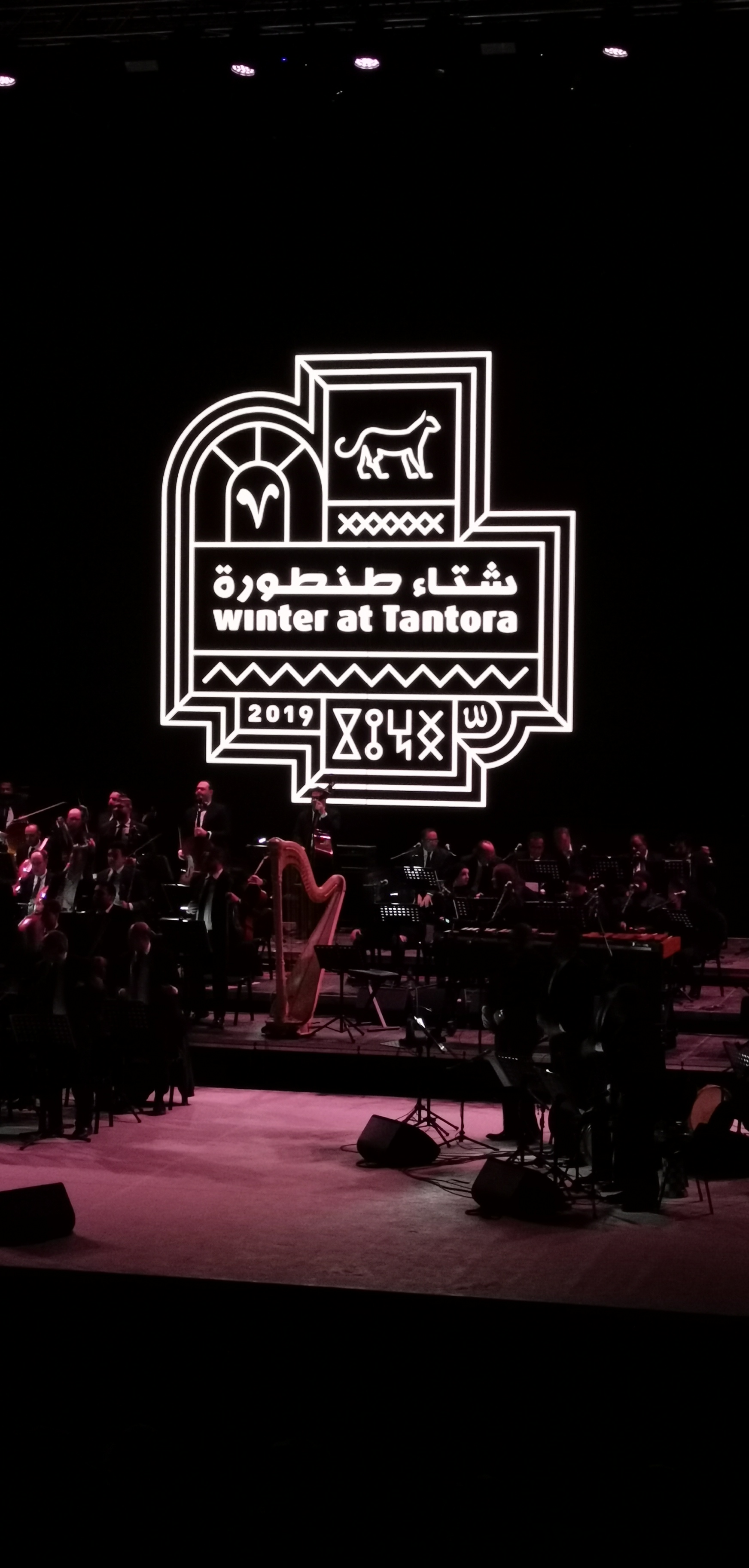 حفل الفنانة عزيزة جلال بموسم شتاء طنطورة